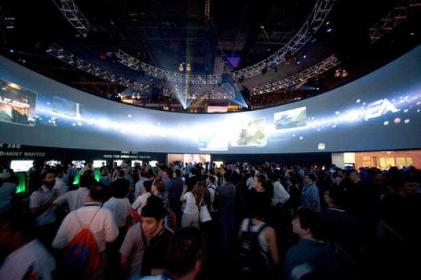 Interior Centro de Convenciones de Los Ángeles